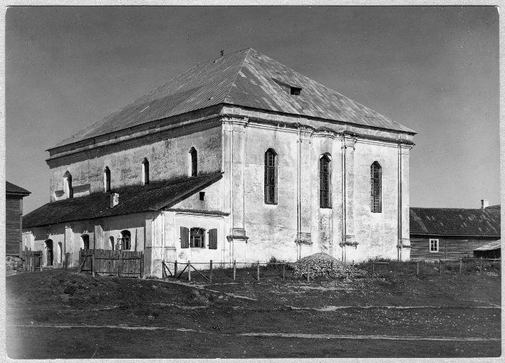 Беларуская (тарашкевіца): Друя (Druja). Сынагога